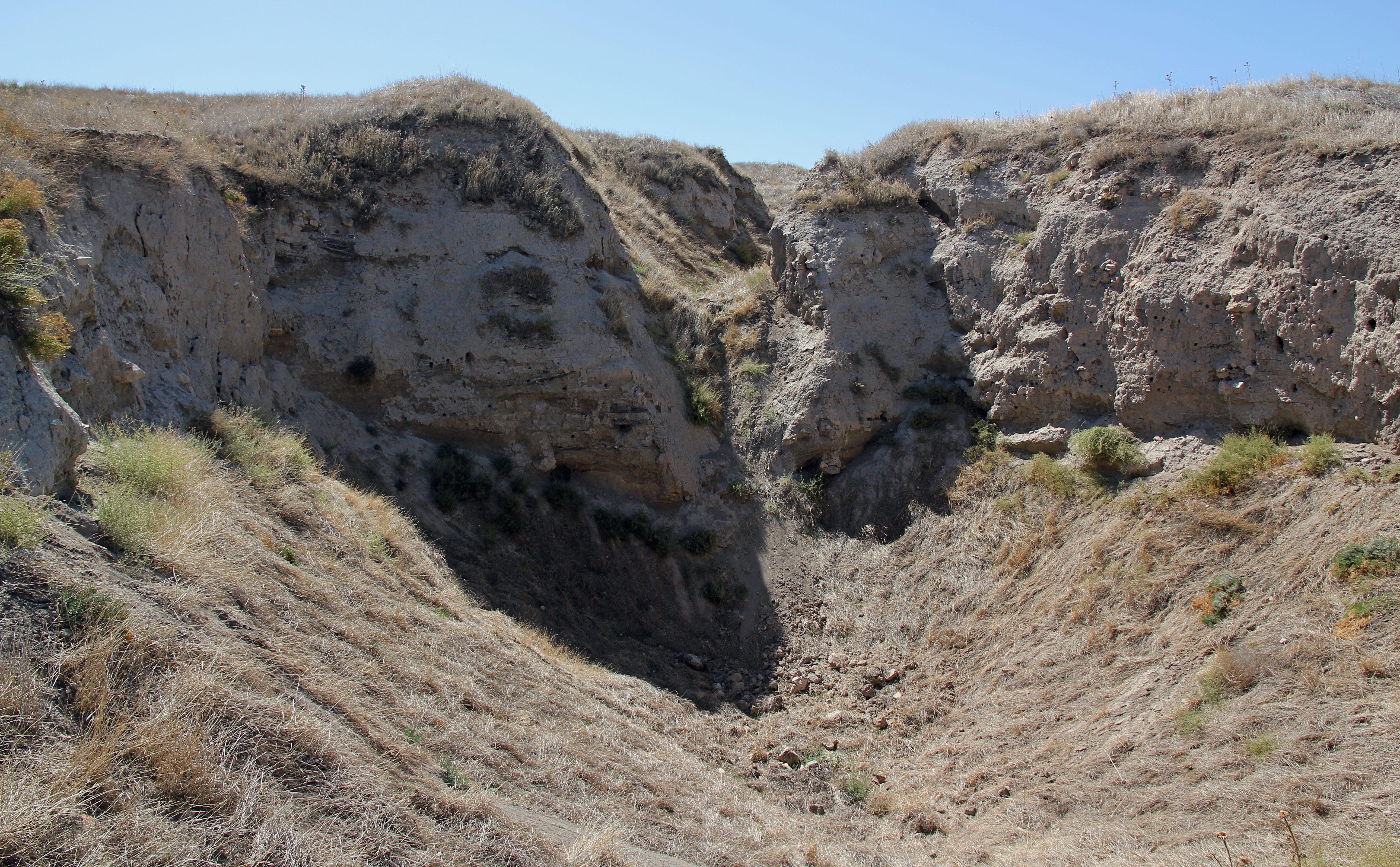 Beycesultan, Siedlungshügel bei Çivril in der westtürkischen Provinz Denizli, Grabungsschnitt "Trench SX"